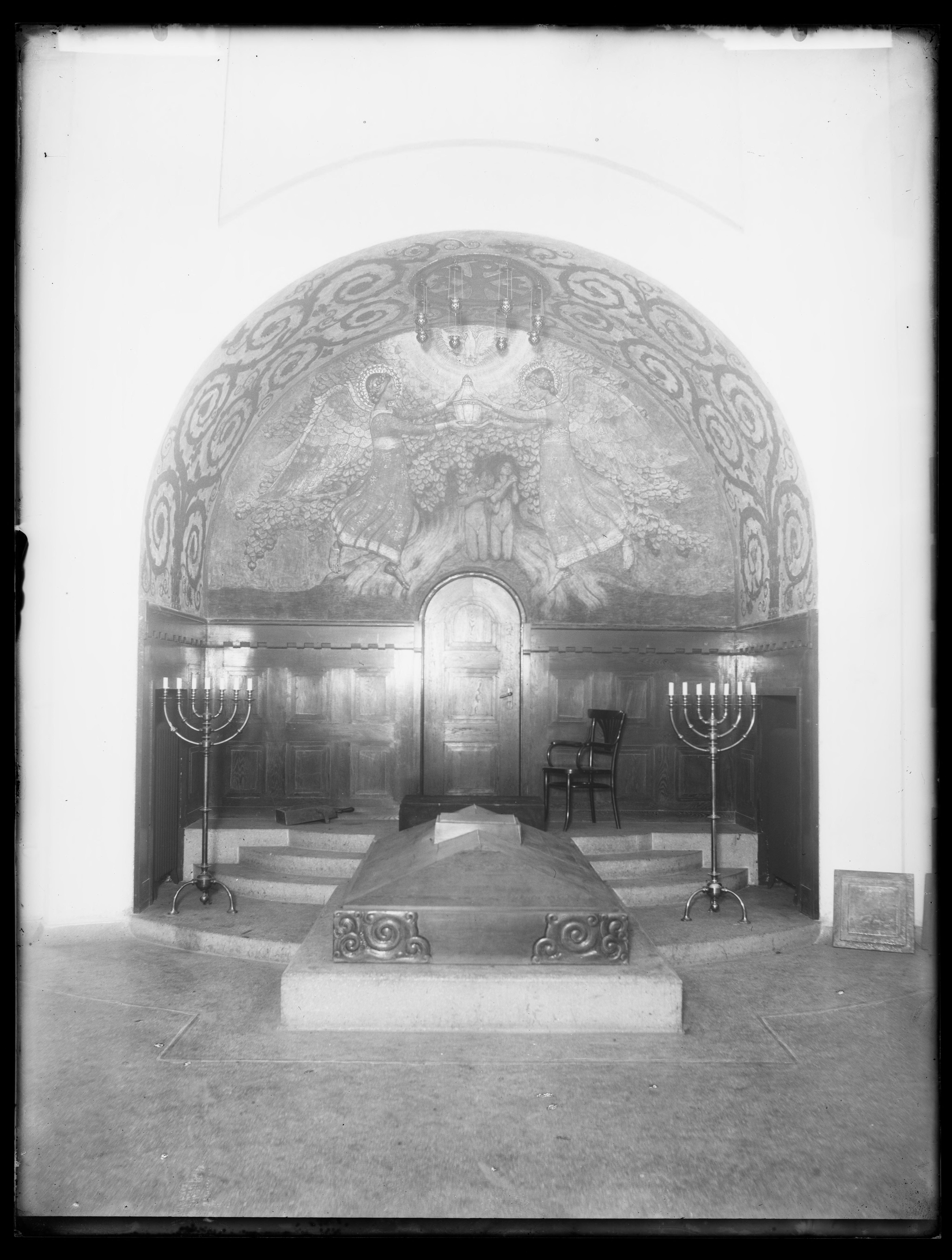 Bildet er hentet fra Nasjonalbibliotekets bildesamling. Anmerkninger til bildet var: Påskrift arkivark: Krematoriet, Vigelands udsmykning Eldste arkivnummer: 931 Yngre arkivnummer: 164 Oslo, Oslo